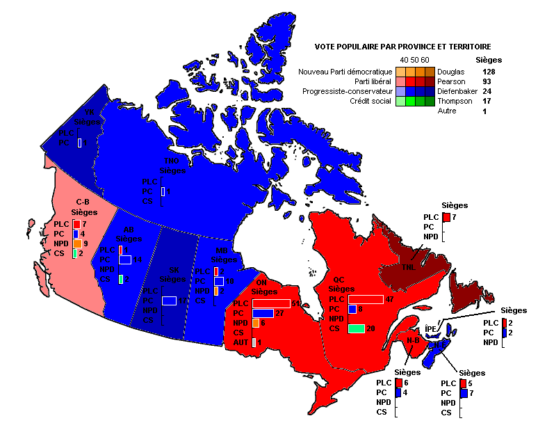 Carte du Canada démontrant le vote populaire lors de l'élection de 1963 avec barres graphiques indiquant le total des sièges de chaque province et territoire